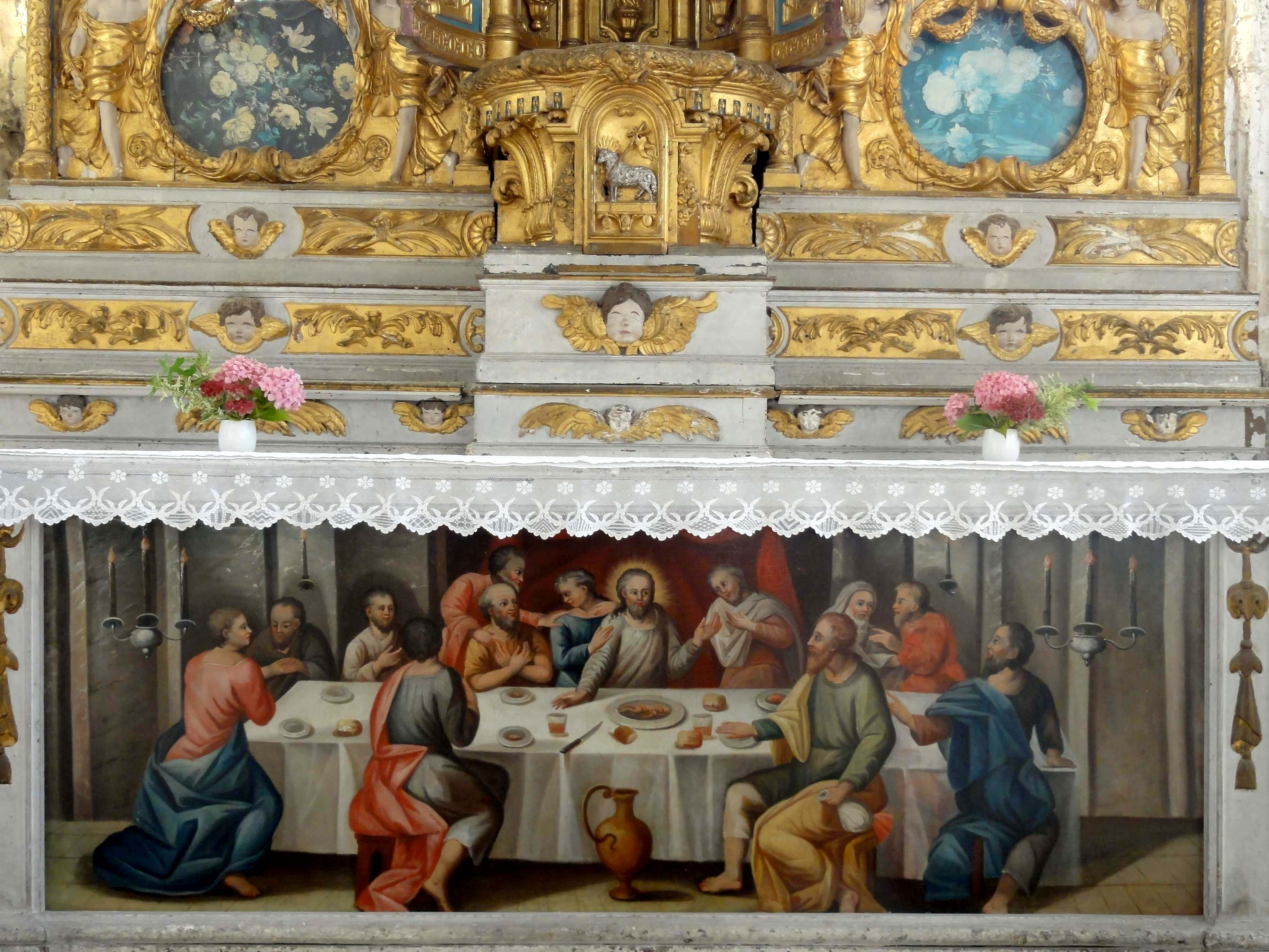 Mobilier de l'église - voir titre.